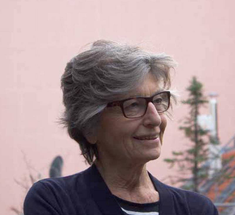 aufgenommen 2016 beim Theaterfestival Steudltenn Uderns